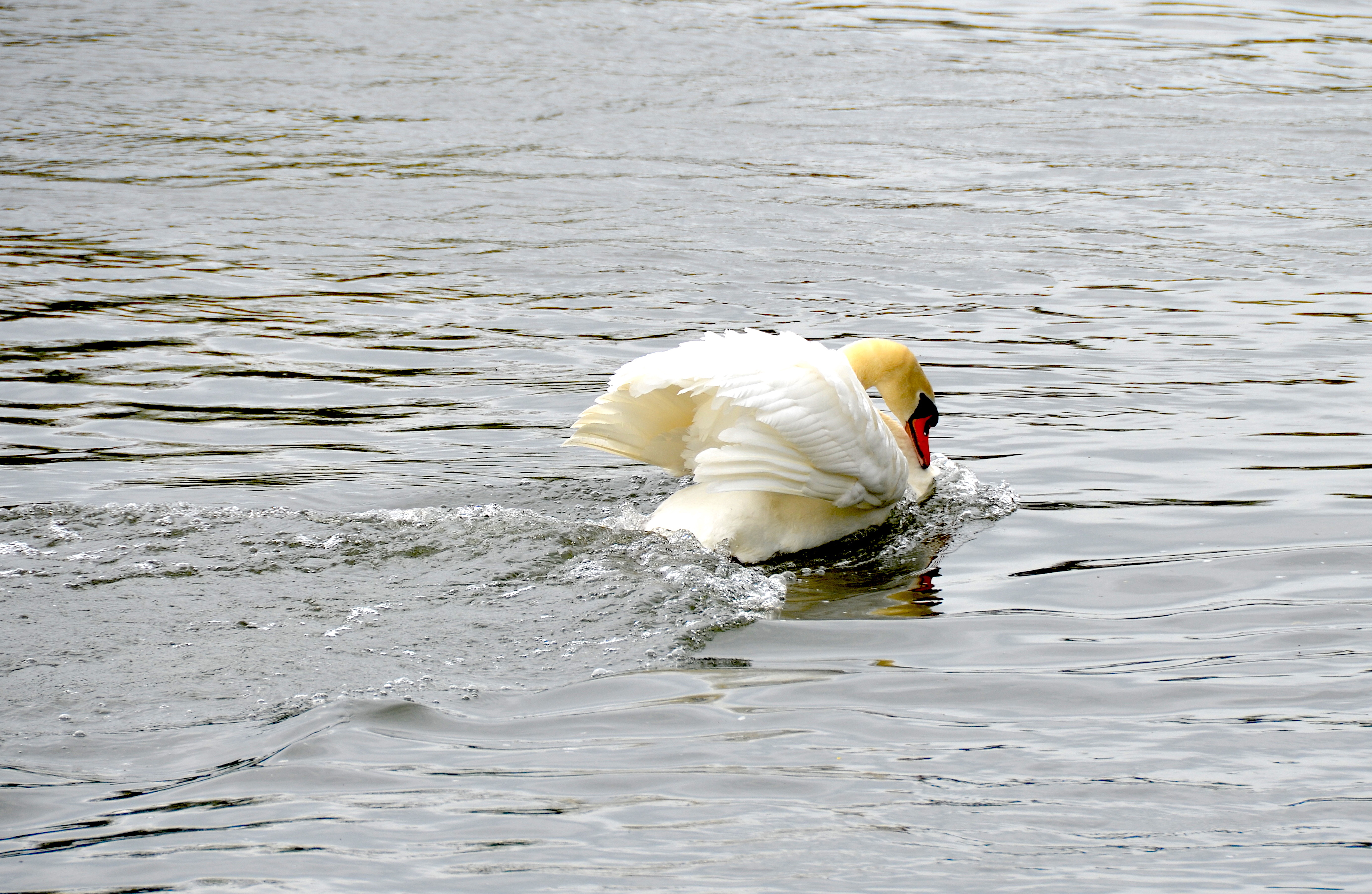 Balzender Schwan auf der Donau